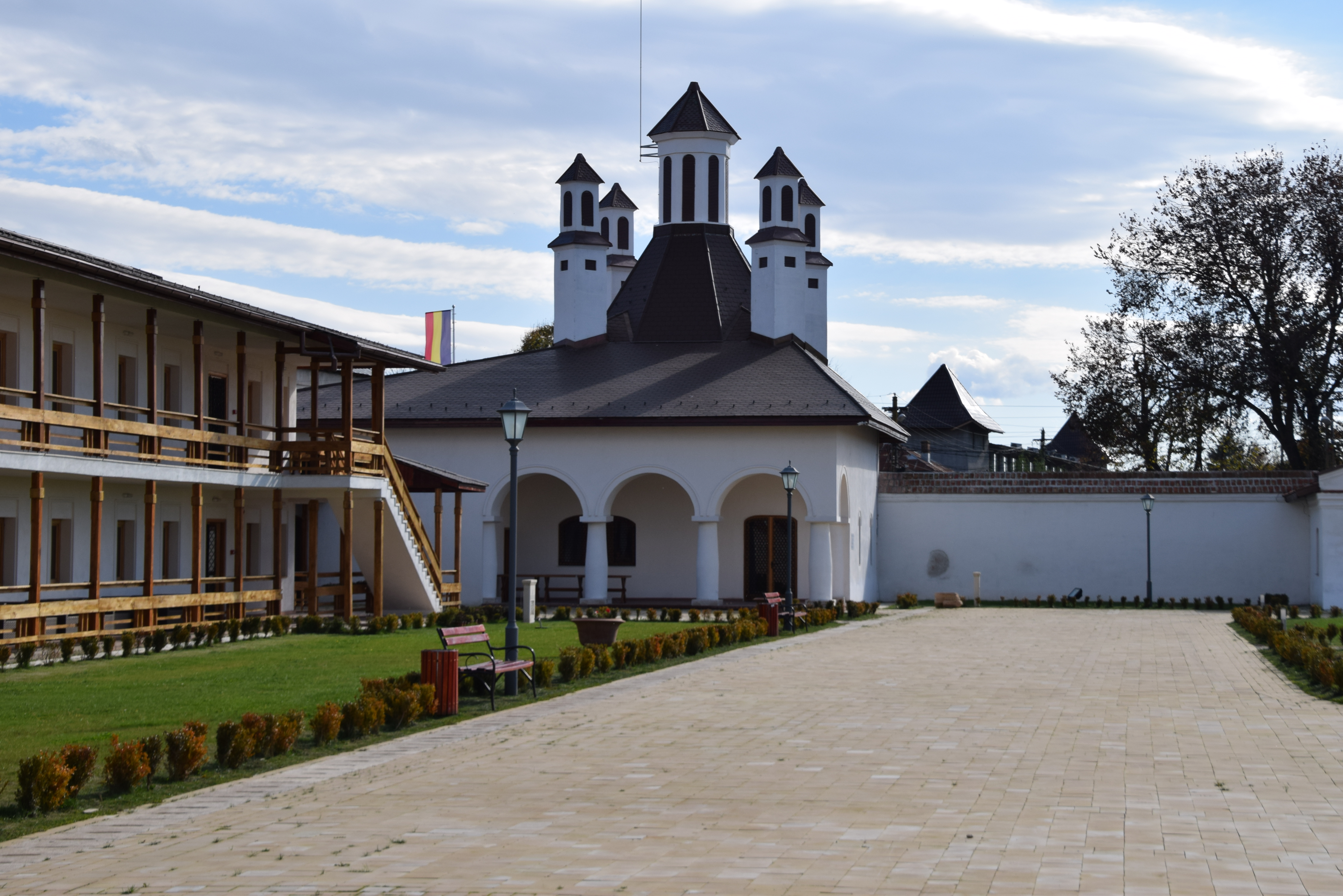 Ruinele cuhniei nu mai sunt vizibile, clădirea fiind reconstruită în timpul restaurărilor din 2014 și de la mijlocul secolului al XX-lea. 05